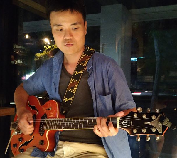 The man is playing a guitar.